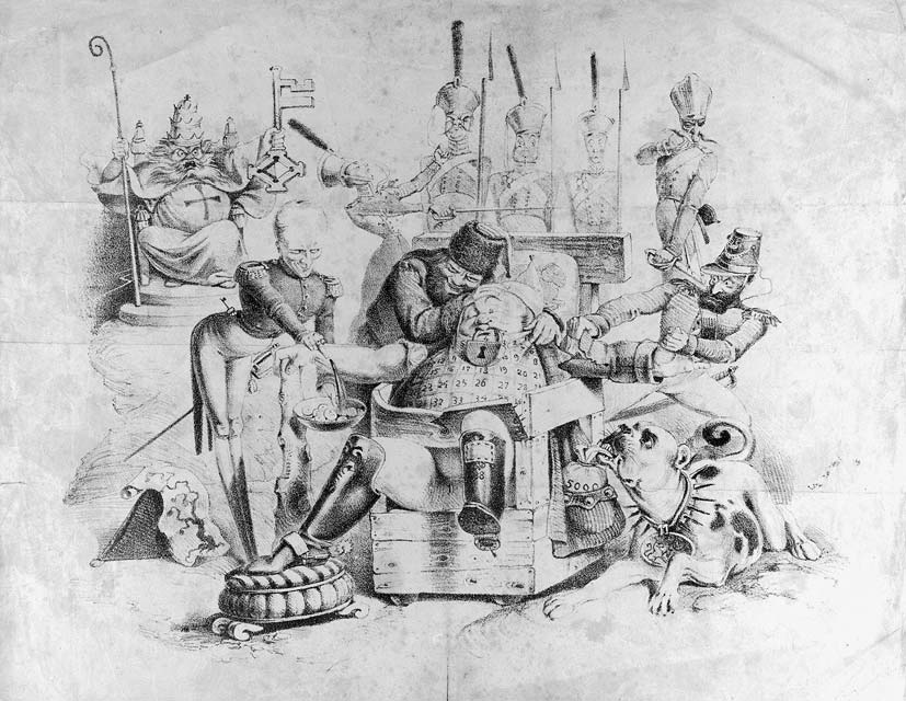 Richard Seel: Der deutsche Michel, August 1842. – Foto: Stadtarchiv Trier.